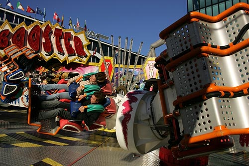 Basler Herbstmesse 2005: "Booster"